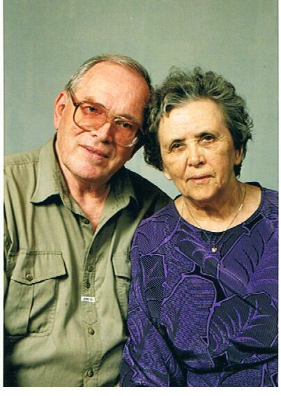 Leonard Ternovsky and Ludmila Ternovskaya